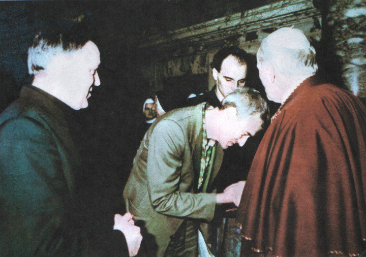 Prywatna audiencja u papieża, Jana Pawła II, po deportacji z Polski 3 maja 1988 roku